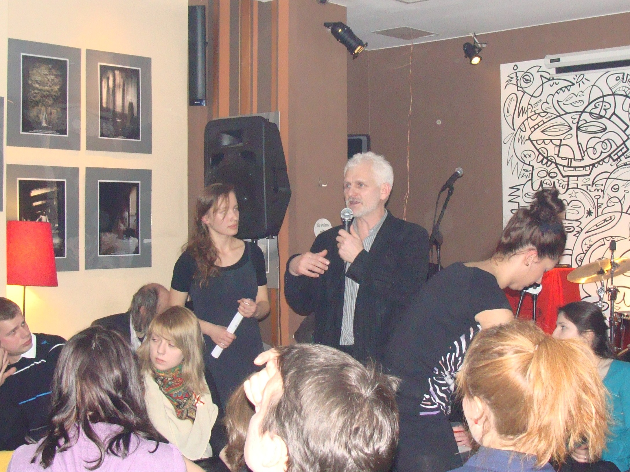 Anastasija Niakrasawa (z lewej) i Alaksandr Bialacki (z prawej) w czasie spotkania w klubie "Grawitacja" w Warszawie, 14 stycznia 2011 roku.